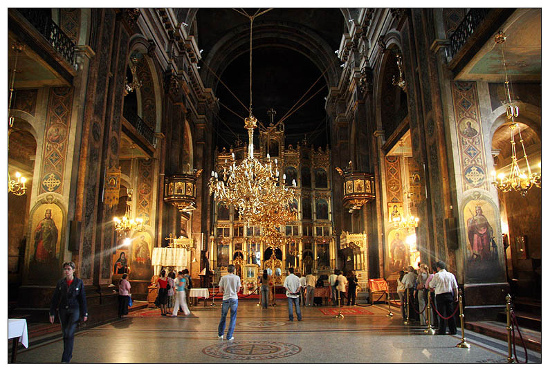 Metropolitan Cathedral, Iaşi, Romania (interior)